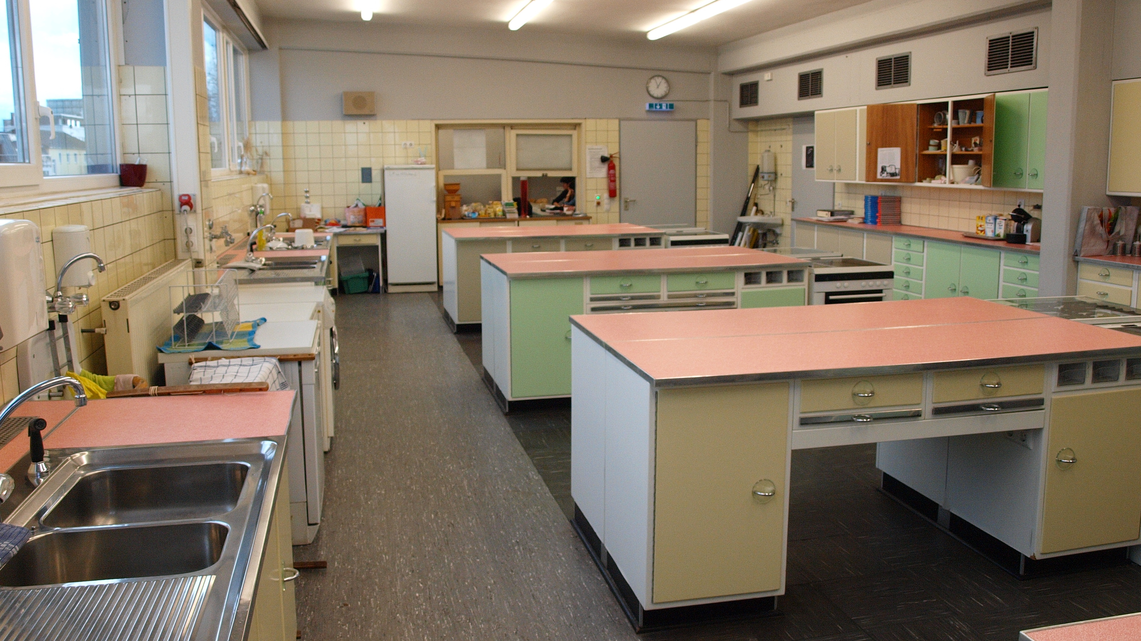 Poggenpohl-Lehrküche, Gymnasium Siegburg Alleestrasse (unter Denkmalschutz)